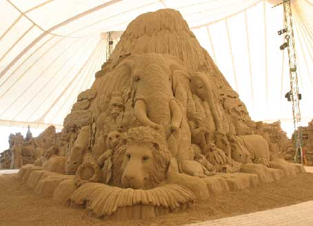 Jesolo Festival Sculture di sabbia 2006 -tema l'Africa